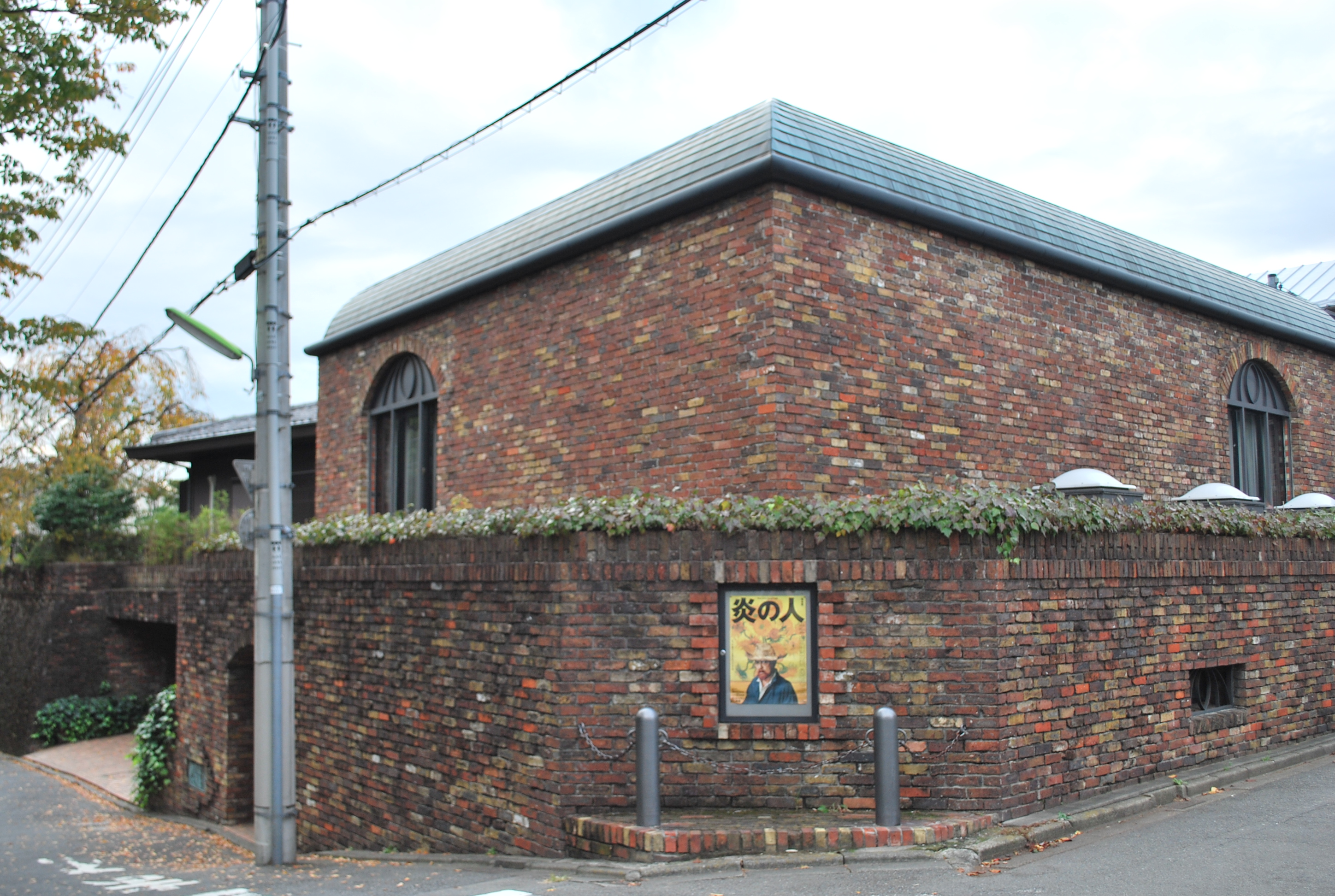 俳優 仲代達也 (Tatsuya Nakadai) 主宰の俳優養成所「無名塾」。 reference